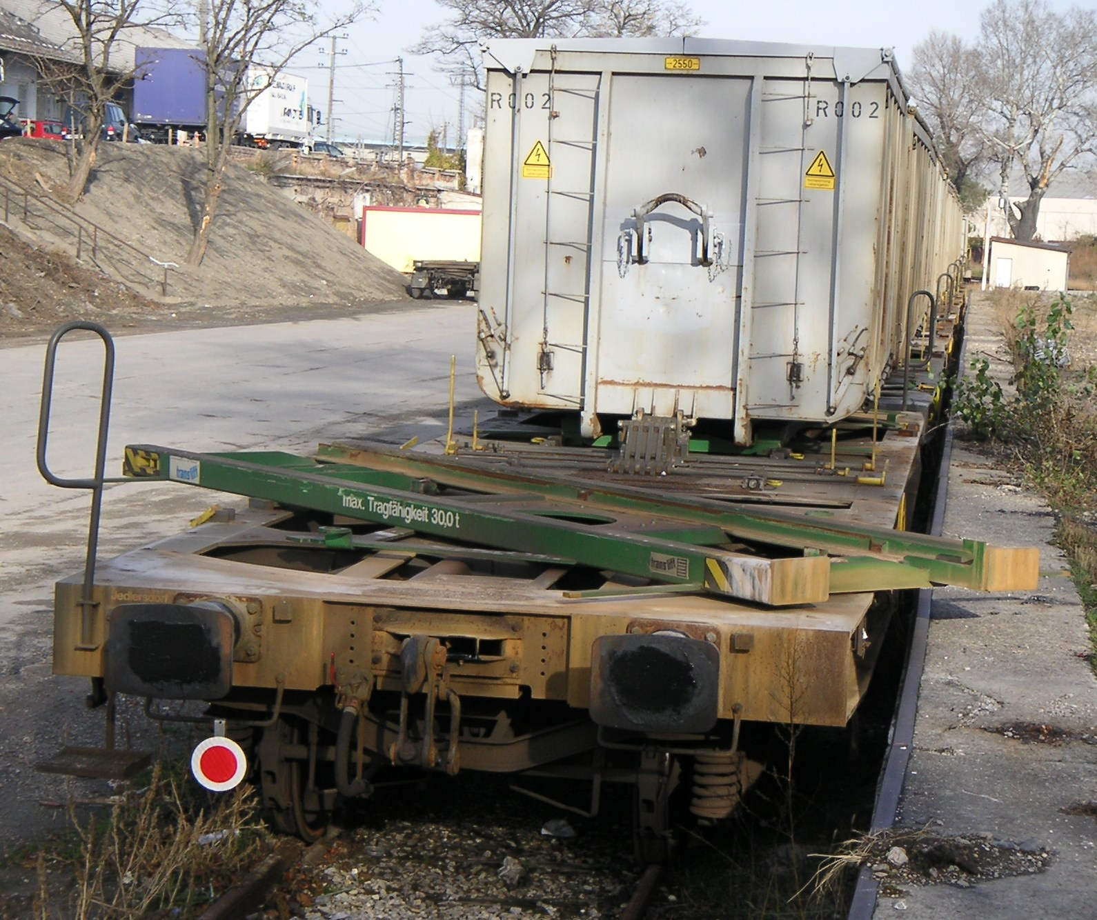 Abrollcontainer-Transportsystem Tragwagen, fotografiert im Bahnhof Floridsdorf Frachtenbahnhof